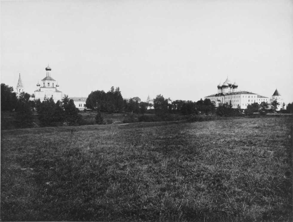 село Измайлово (1891 год)